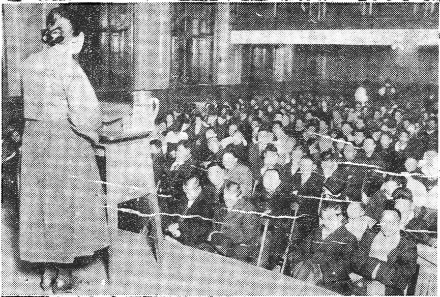 1926년 2월 22일 자유연애 대강연회에 선 일엽 김원주, 경성 중앙기독교청년회관